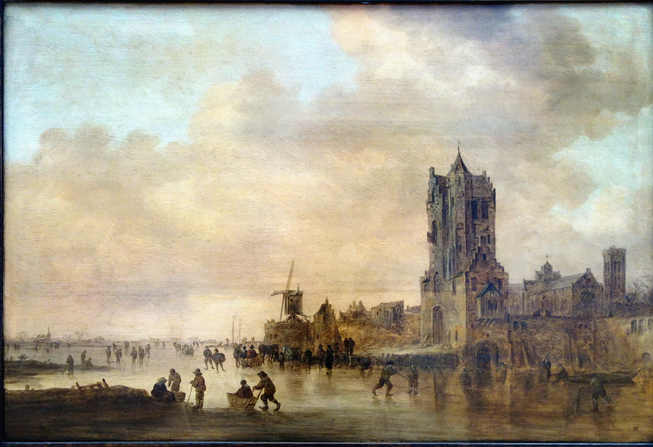 Paysage de fantaisie avec la Pellekussenpoort d'Utrecht